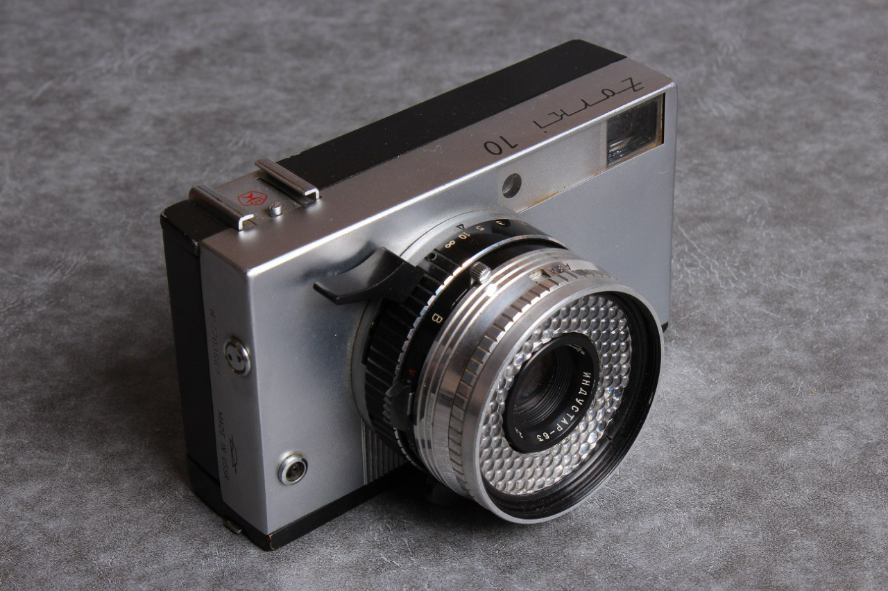 Фотокамера Зоркий-10